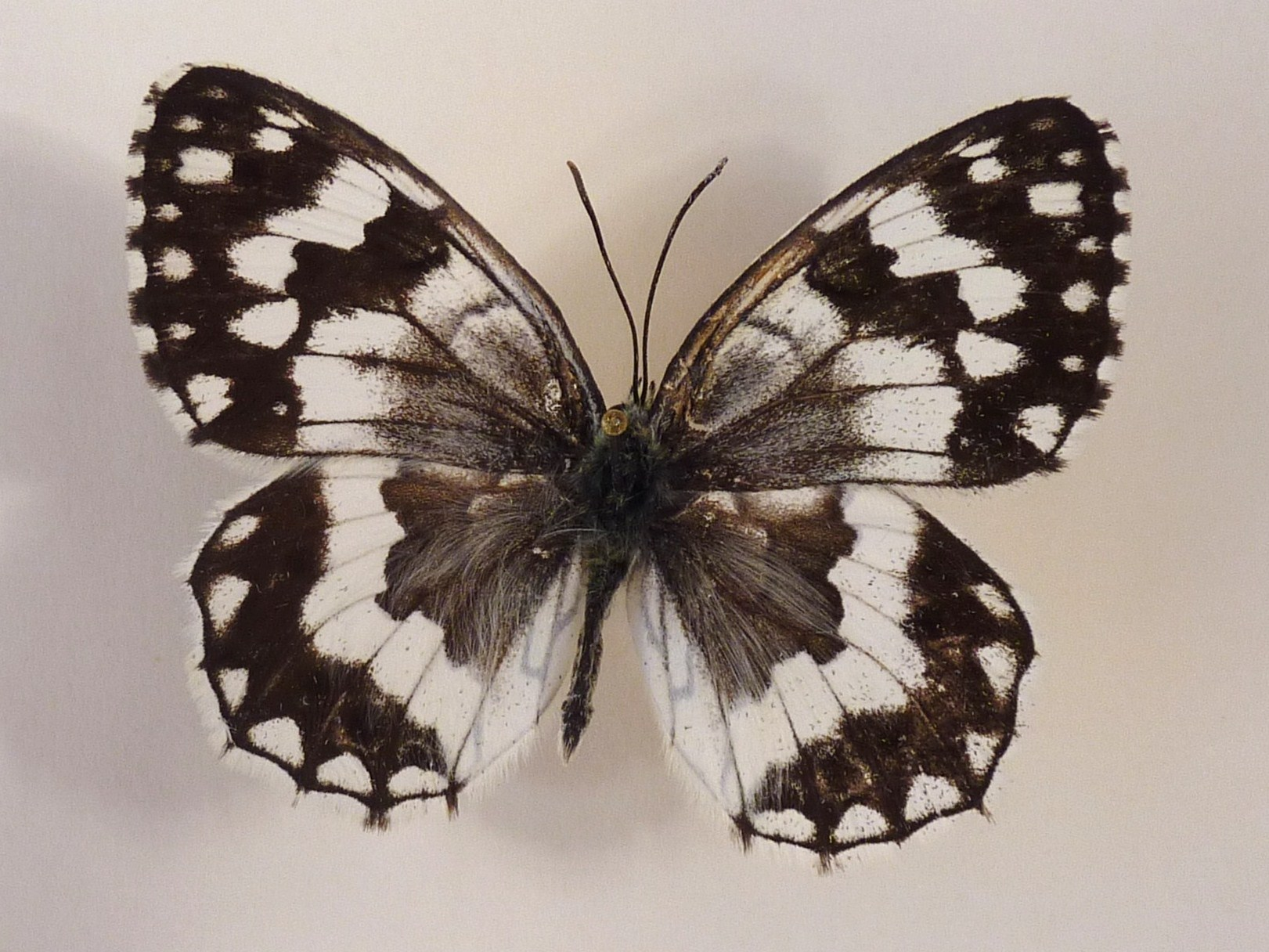 Melanargia Larissa, dessus, région de Kalavrita, Grèce, juin 2014